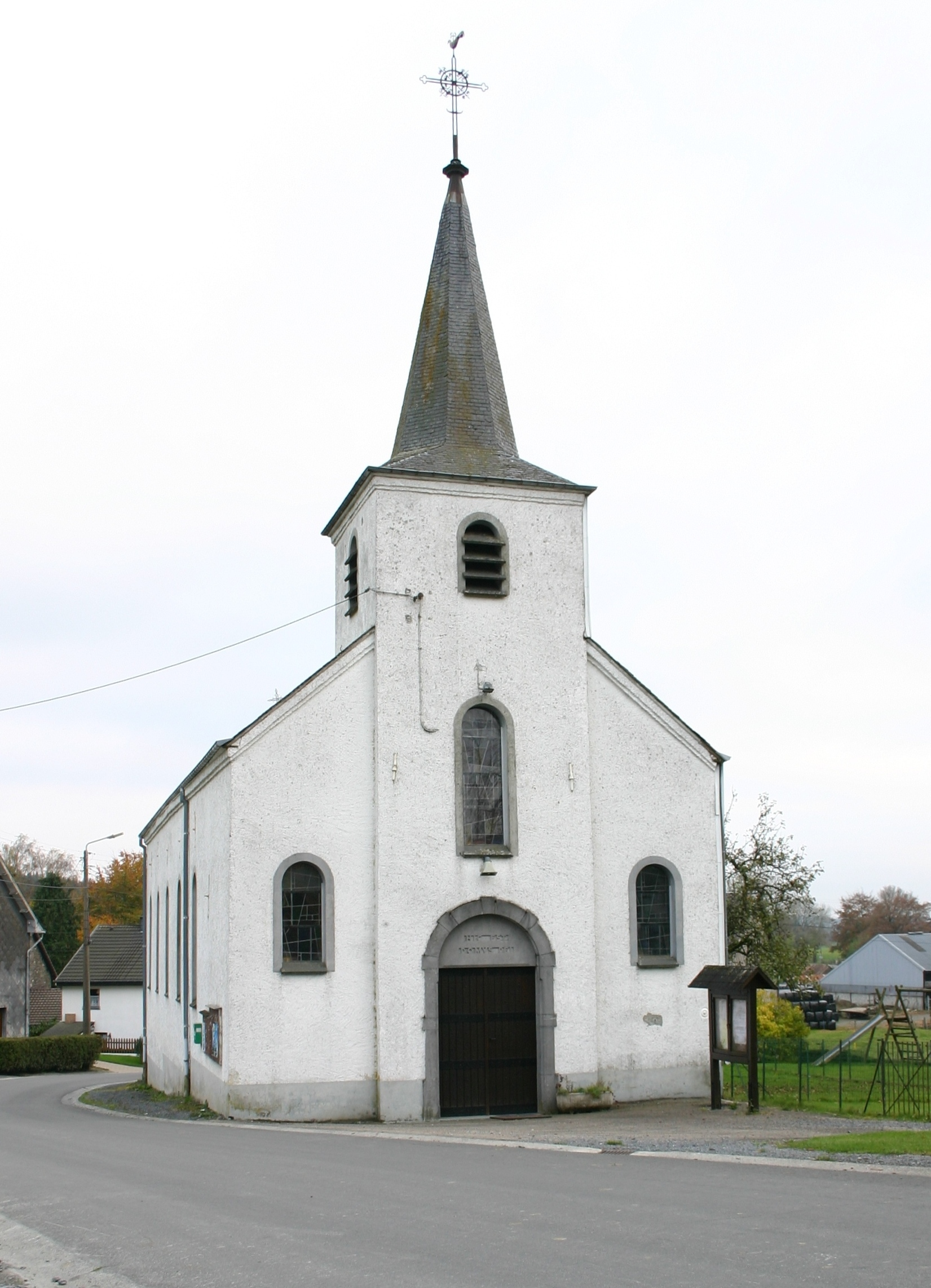 Kierch vun Assenois.